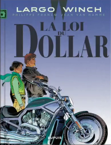 Couverture d'un des albums de Largo Winch (bande dessinée)